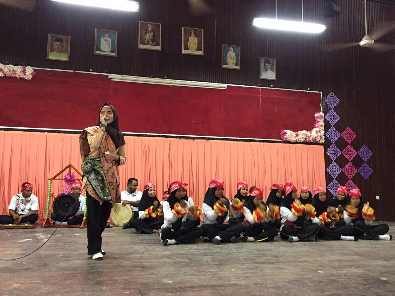 persembahan pelajar